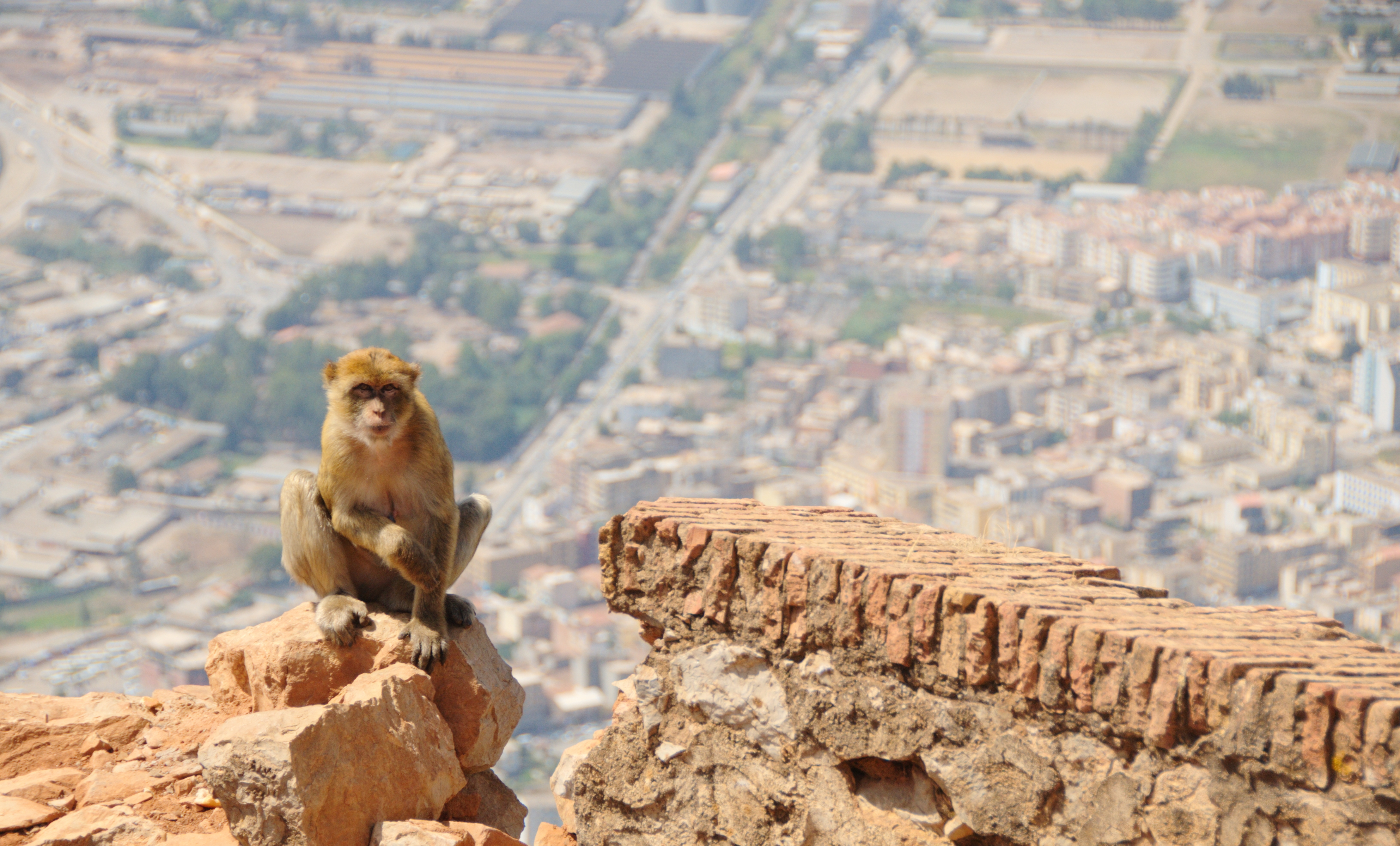 Magot à Yemma Gouraya, Béjaïa